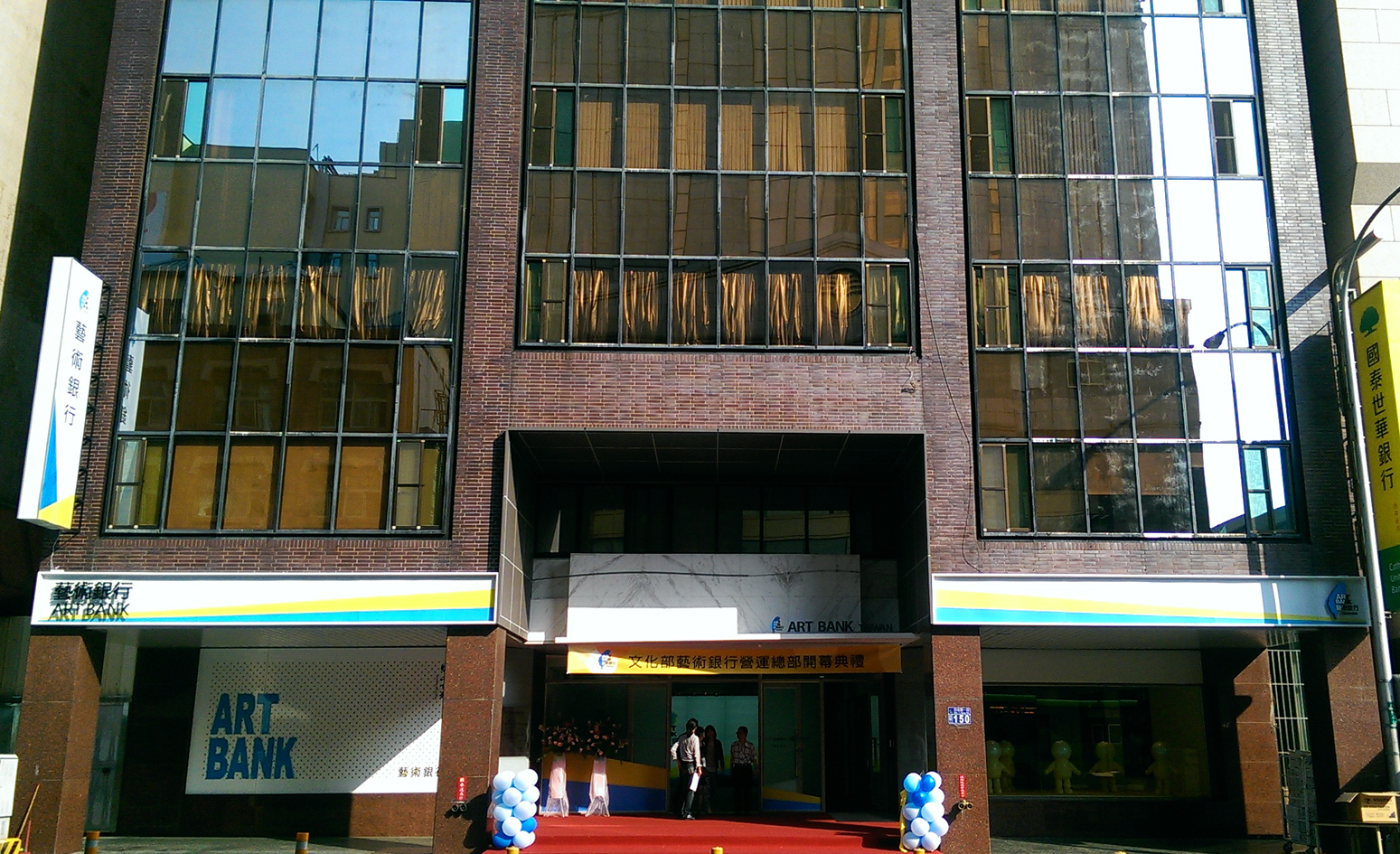 中文（台灣）: 文化部藝術銀行（原行政院新聞局地方新聞處／臺灣省政府新聞處），位於臺灣臺中市西區自由路一段150號。